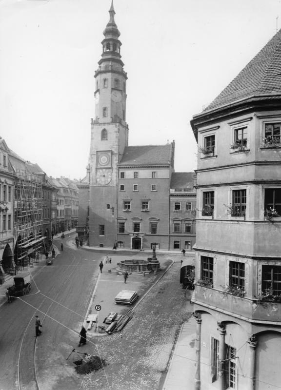 Das Rathaus in Görlitz (Niederschlesien)